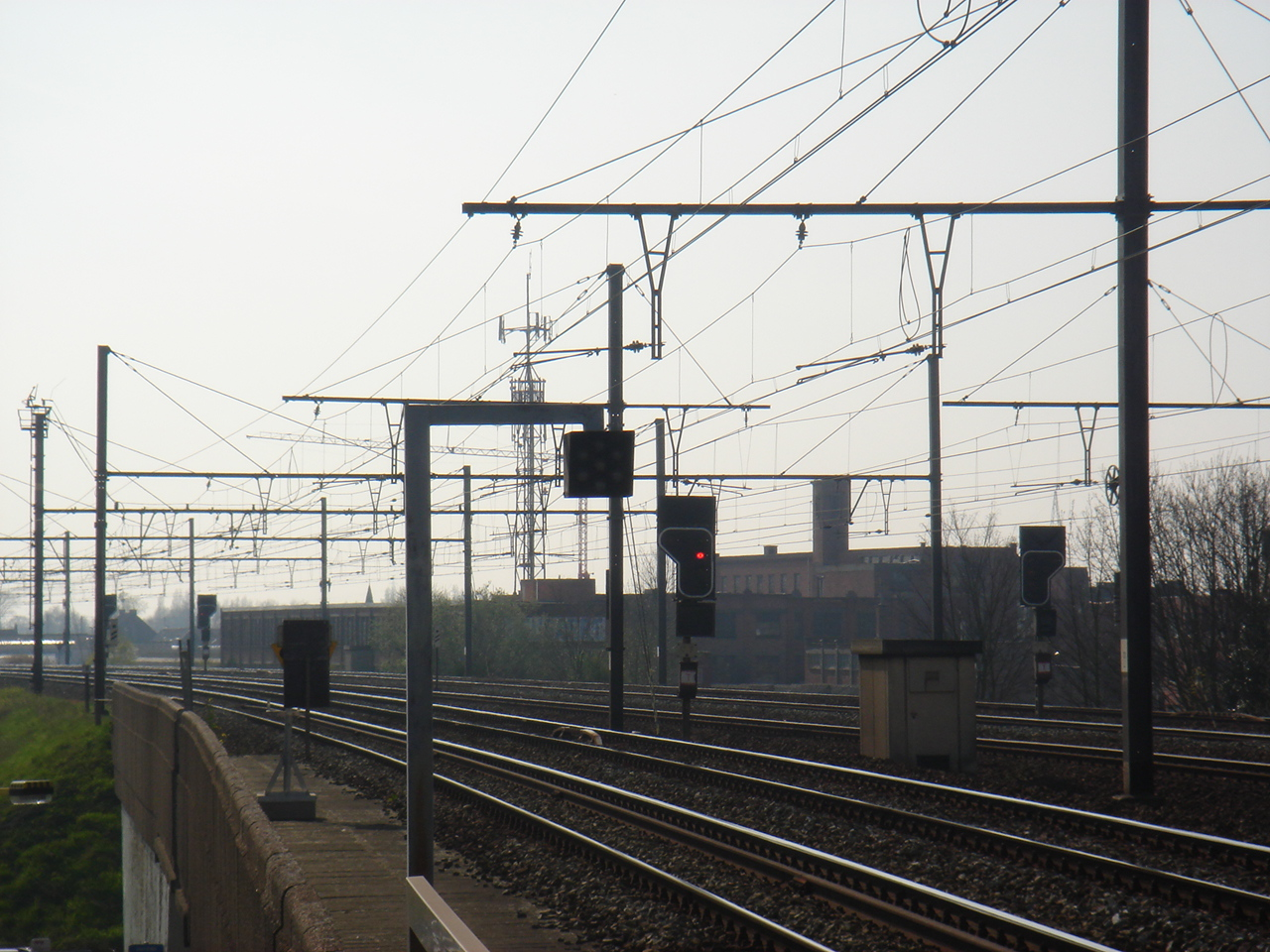 An AVG (aanwijzer verrichtingen gedaan, in Dutch) or IOT (indicateur d'opérations terminées, in French) in the station of Deinze